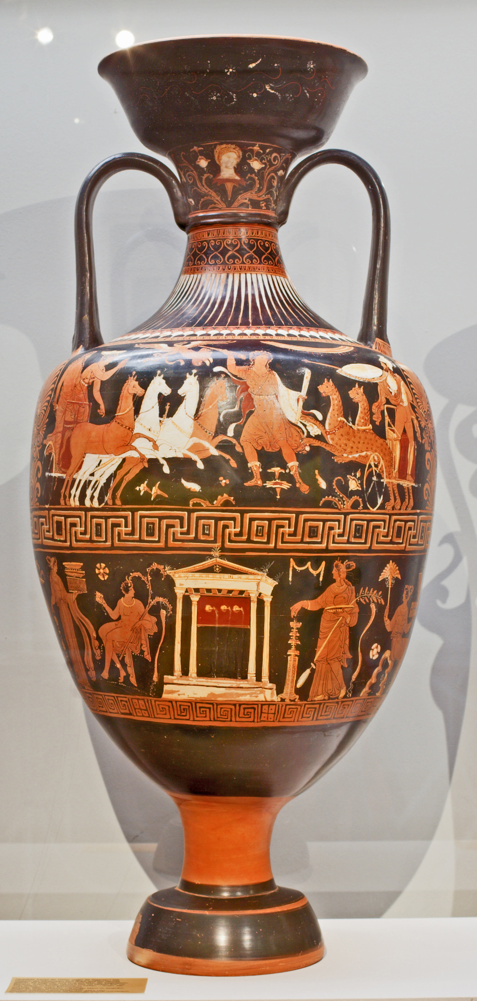 Kampf der Götter gegen die Giganten? Das Gespann des Zeus (links) wird von Hermes gelenkt. Als Sieger wird Zeus von Nike bekränzt. Eine Göttin (Artemis oder Hekate) holt nmit Fackeln aus, um den Gegner im Panthergespann zu treffen. Unten Pan und Frau neben Brunnenhaus